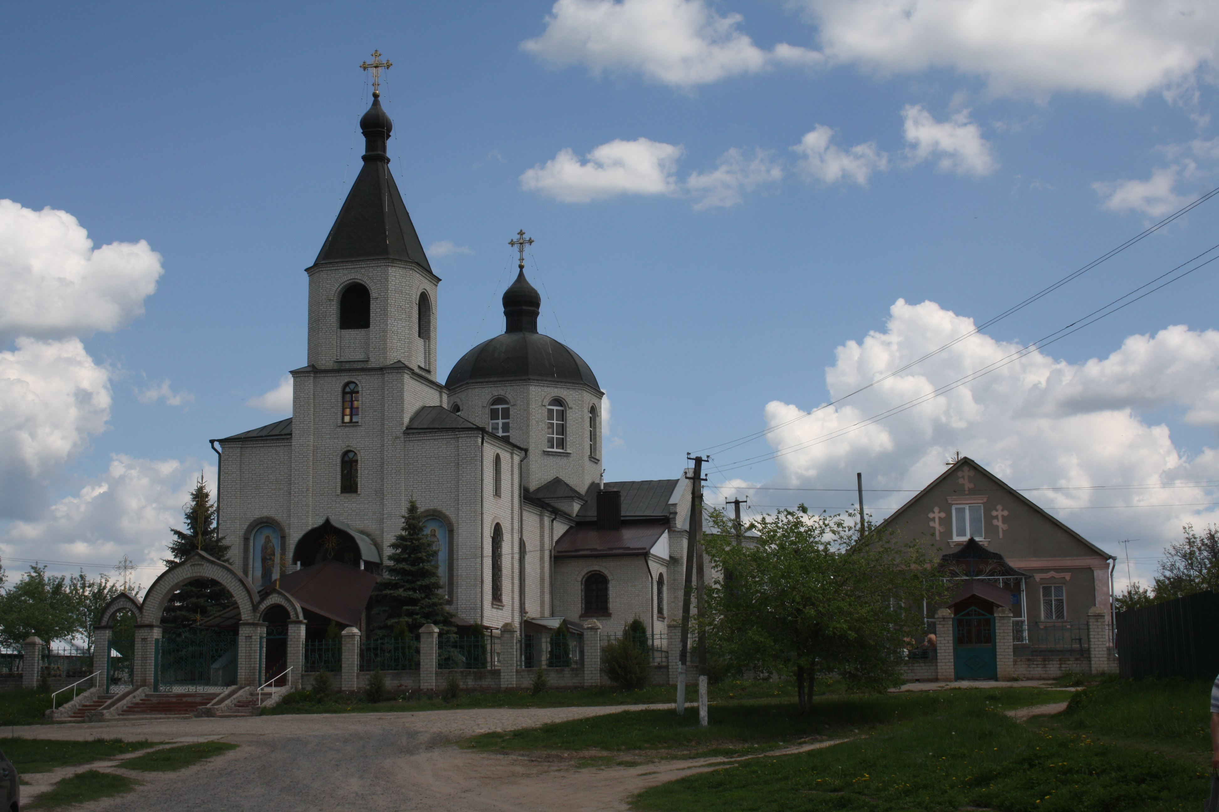 Церква, Руська Лозова, вид зліва.